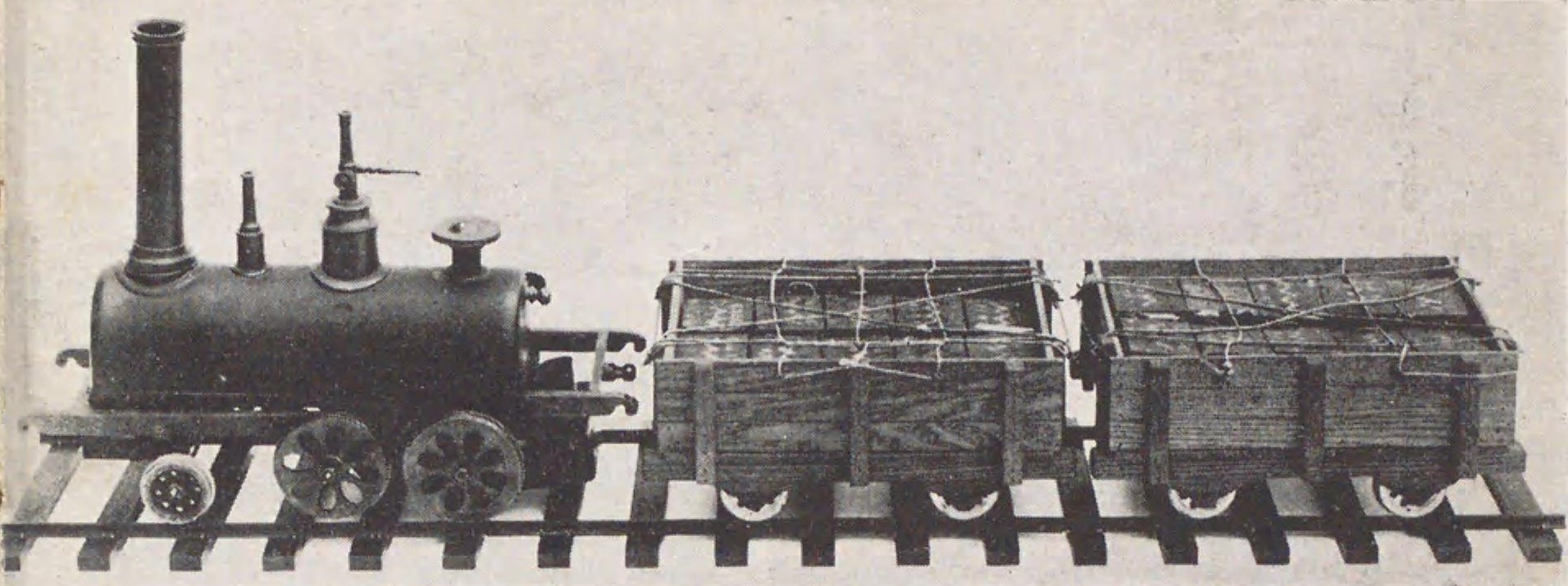 中村奇輔、石黒寛次、福谷啓吉や田中久重親子が製作した蒸気車雛形（公益財団法人鍋島報效会所蔵）。鉄道記念物および佐賀県重要文化財に指定されている。